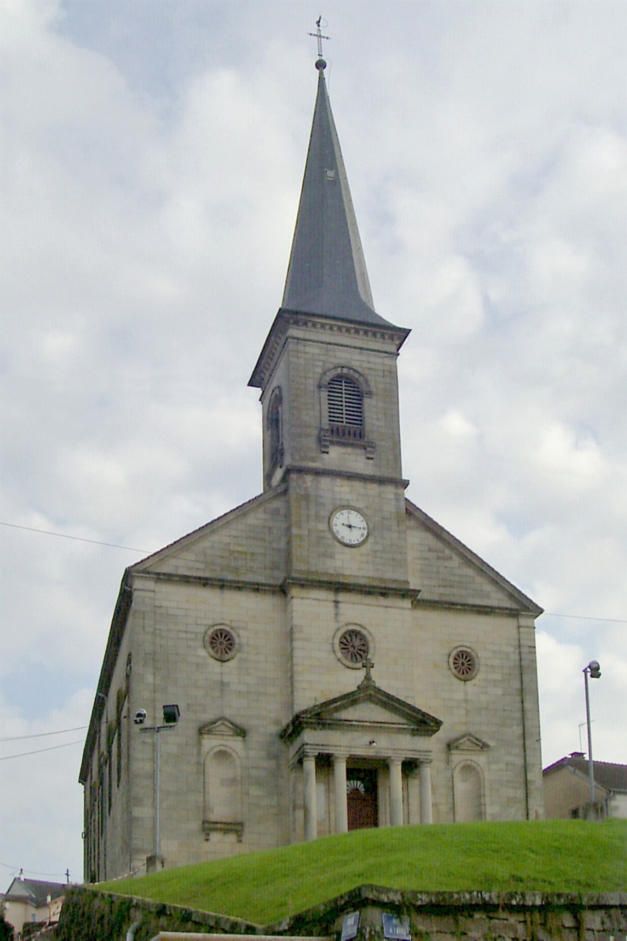 L'église de la Décollation-de-Saint-Jean-Baptiste d'Aillevillers